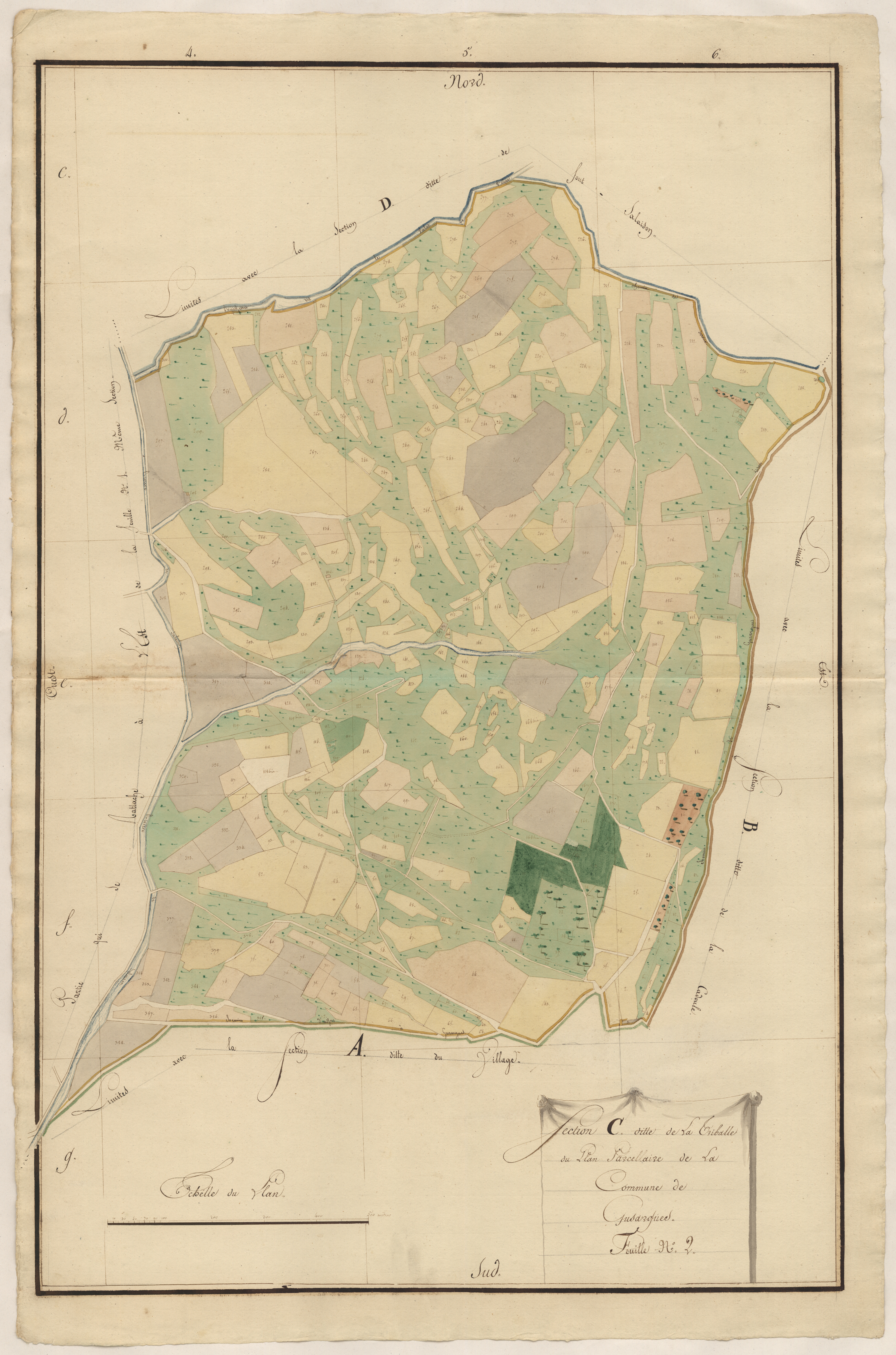 Guzargues. - Cadastre napoléonien : section C2 de La Triballe.